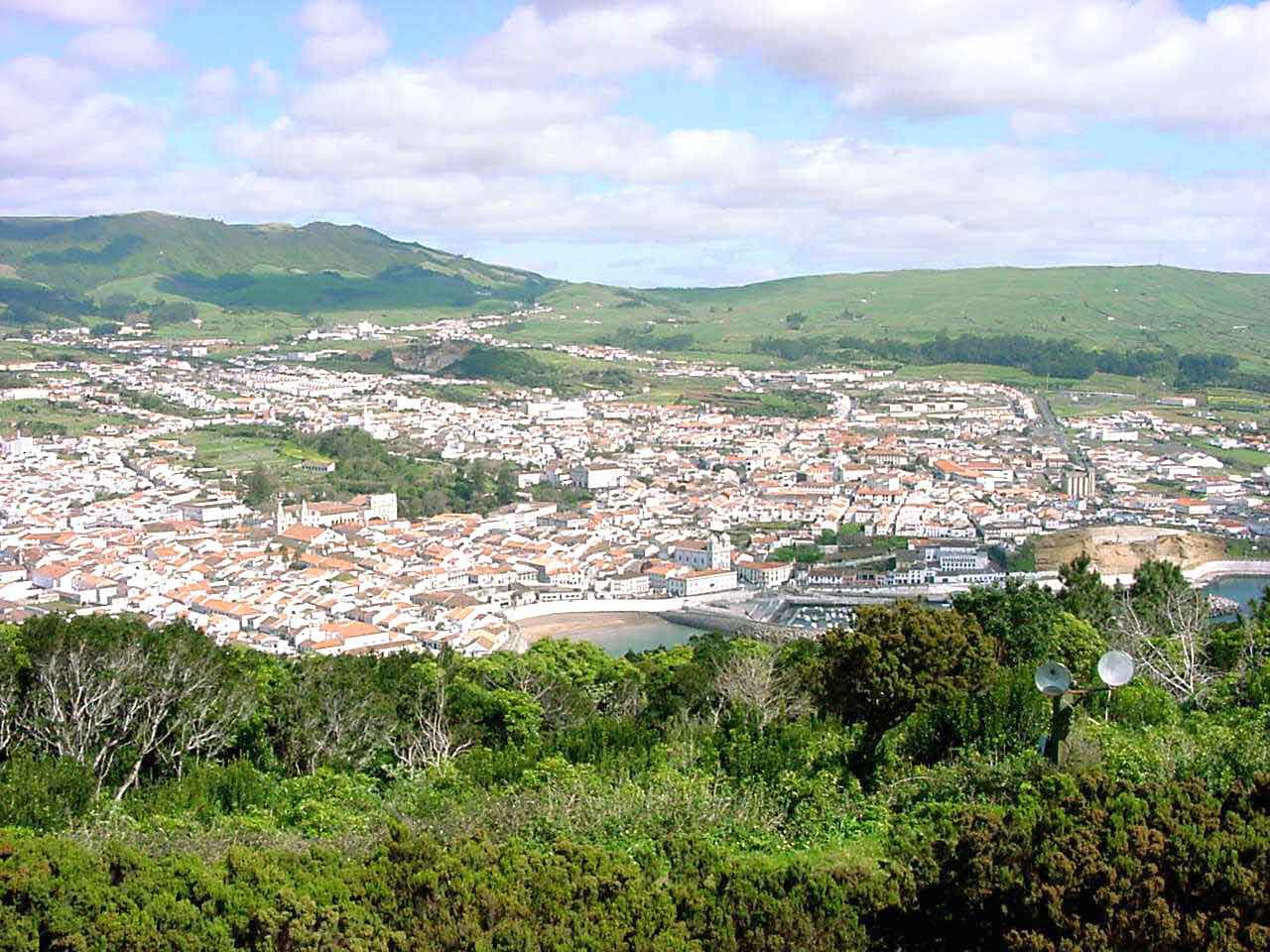 Monte Brasil, vista da cidade de Angra do Heroísmo, Ilha Terceira, Açores, Portugal